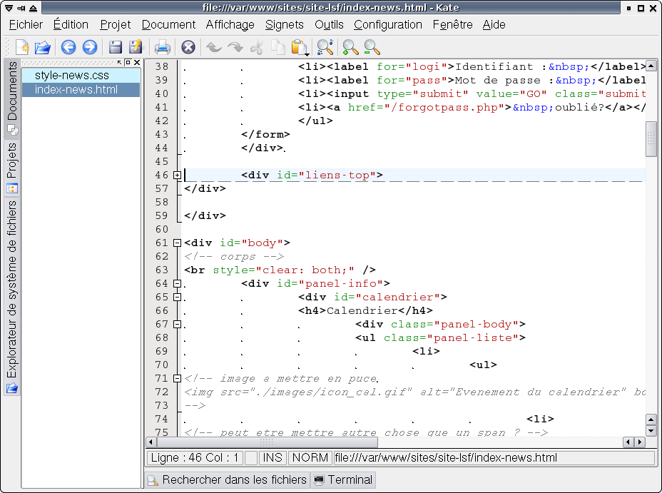 Capture d'écran de kwrite pendant l'édition d'un fichier HTML